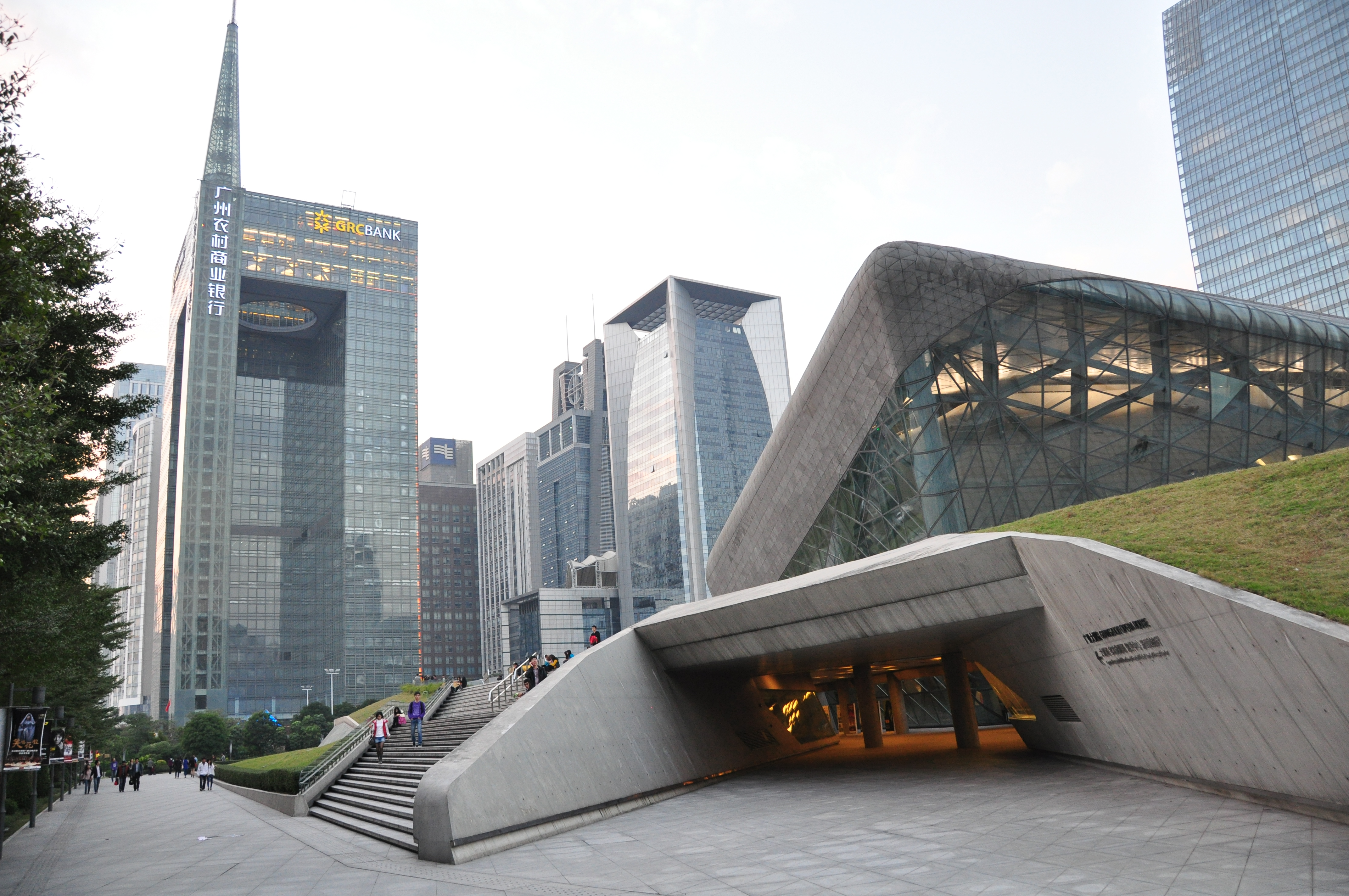 Guangzhou